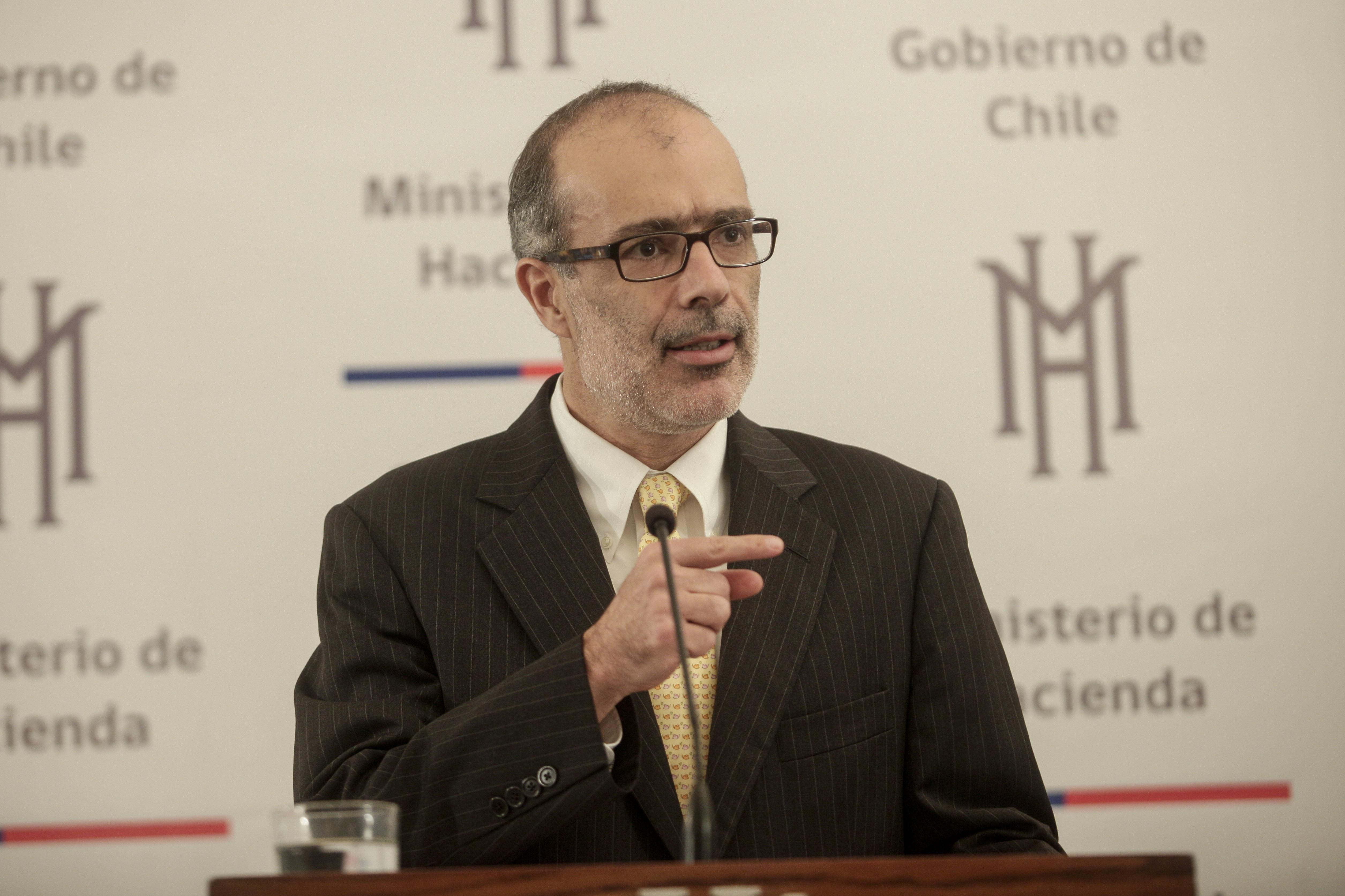 Rodrigo Valdés Pulido en 2015.